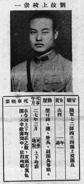 抗戰軍人忠烈錄第一輯中的烈士遺像